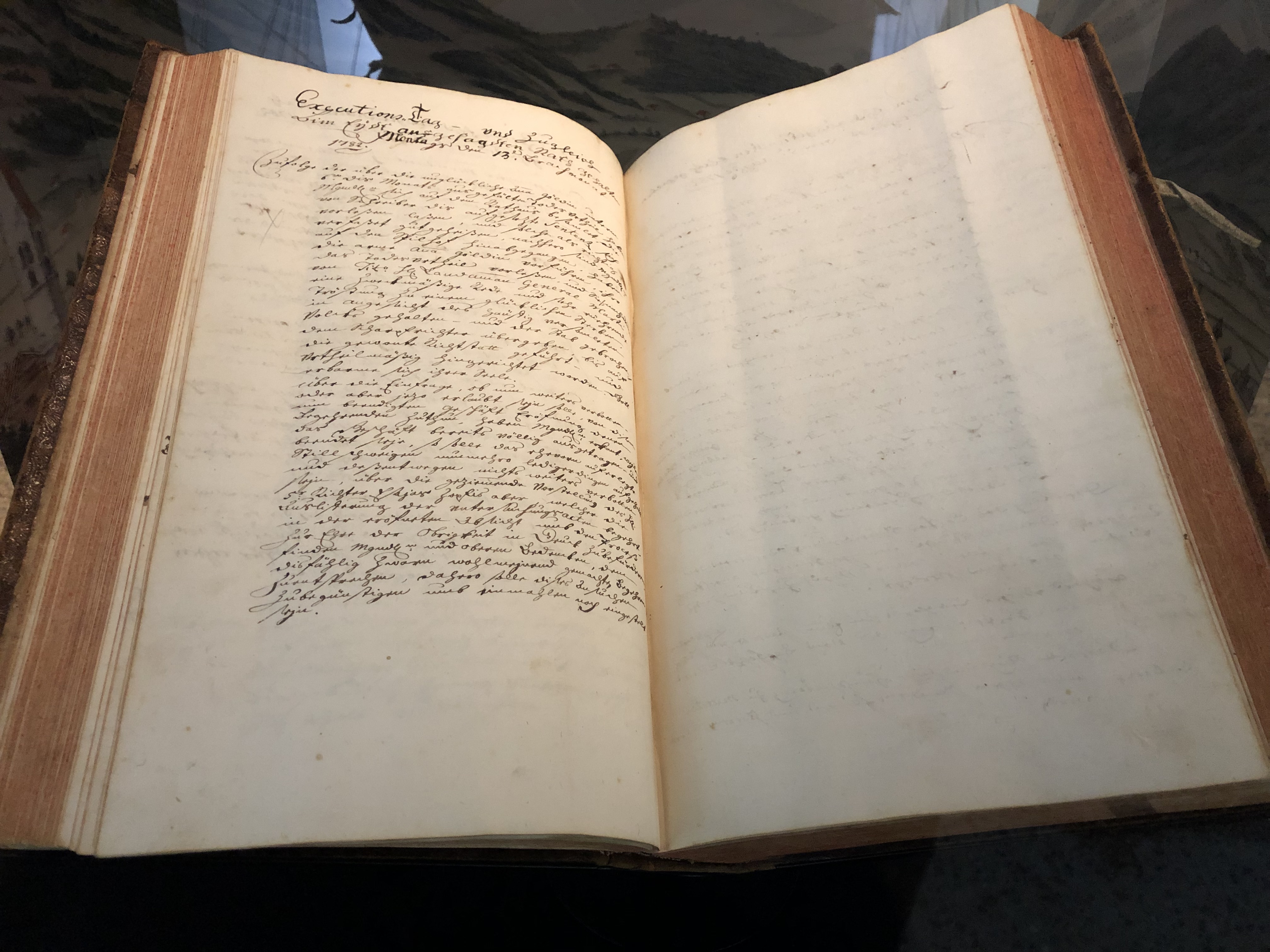 Anna Göldi, Beschreibung des Exekutionstags (Landesarchiv Kanton Glarus)